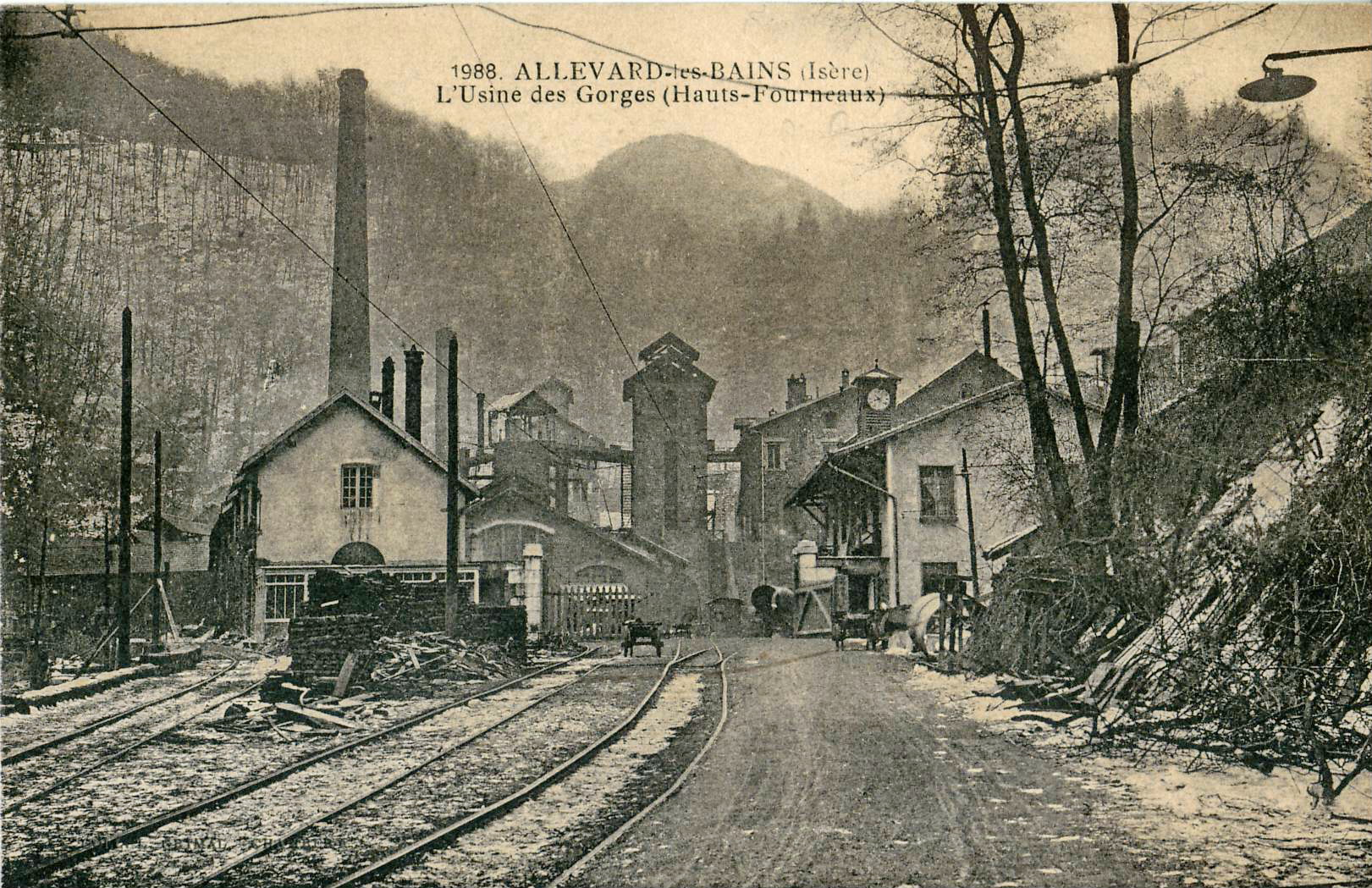 Carte postale ancienne, sans mention d'éditeur, n°1988 : ALLEVARD-LES-BAINS (Isère) : L'Usine des Gorges (Hauts-Fourneaux) Au premier plan, voies de chemin de fer reliant l'usine des gorges aux mines de Saint-Pierre d'Allevard et à la gare du Cheylas, appelé familièrement le Tacot, qui a fonctionné jusqu'en 1968